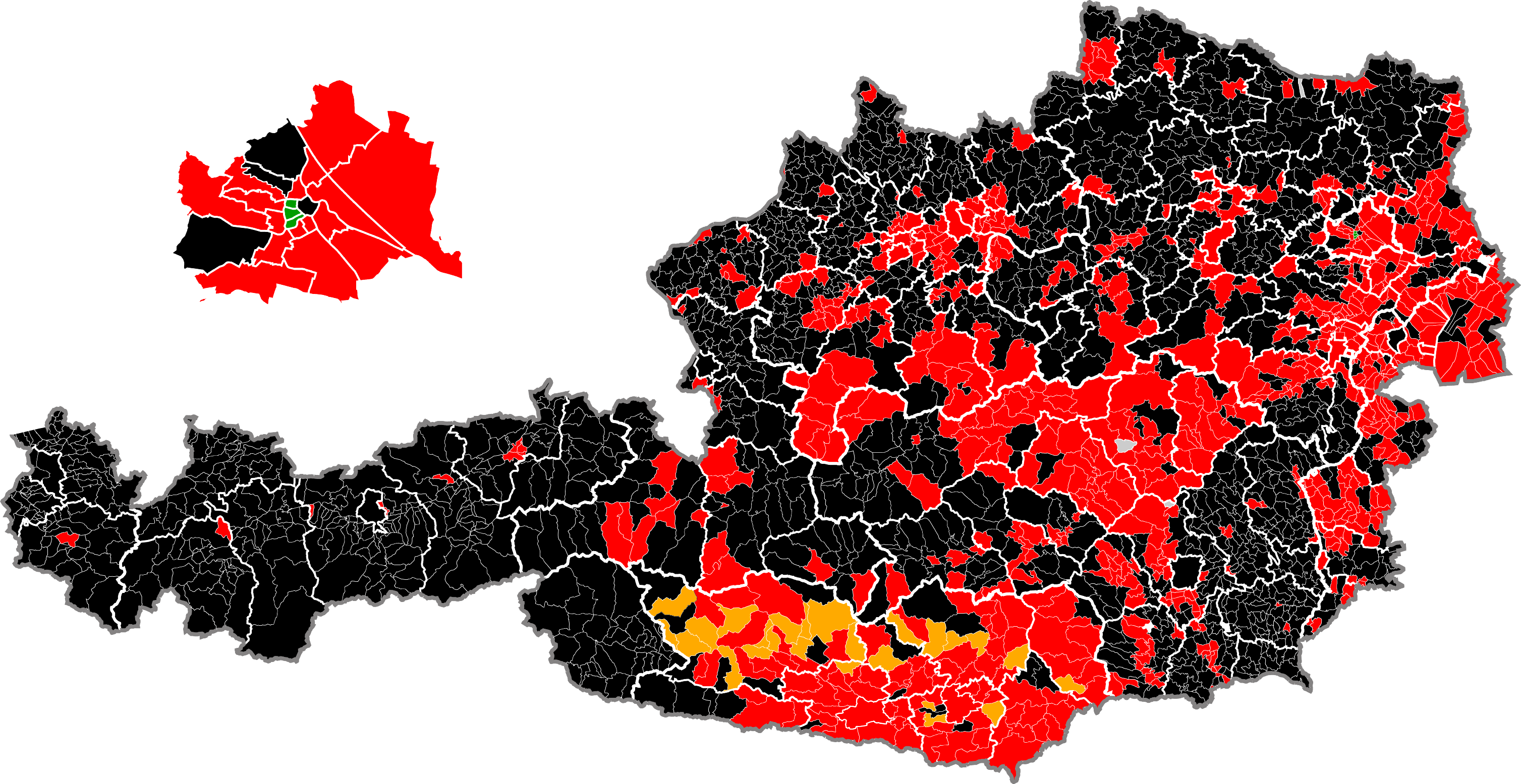 Nationalratswahlen 2006; Stärkste Parteien in den Gemeinden nach dem vorläufigen Endergebnis. Quelle: Der Standard 3. Oktober 2006